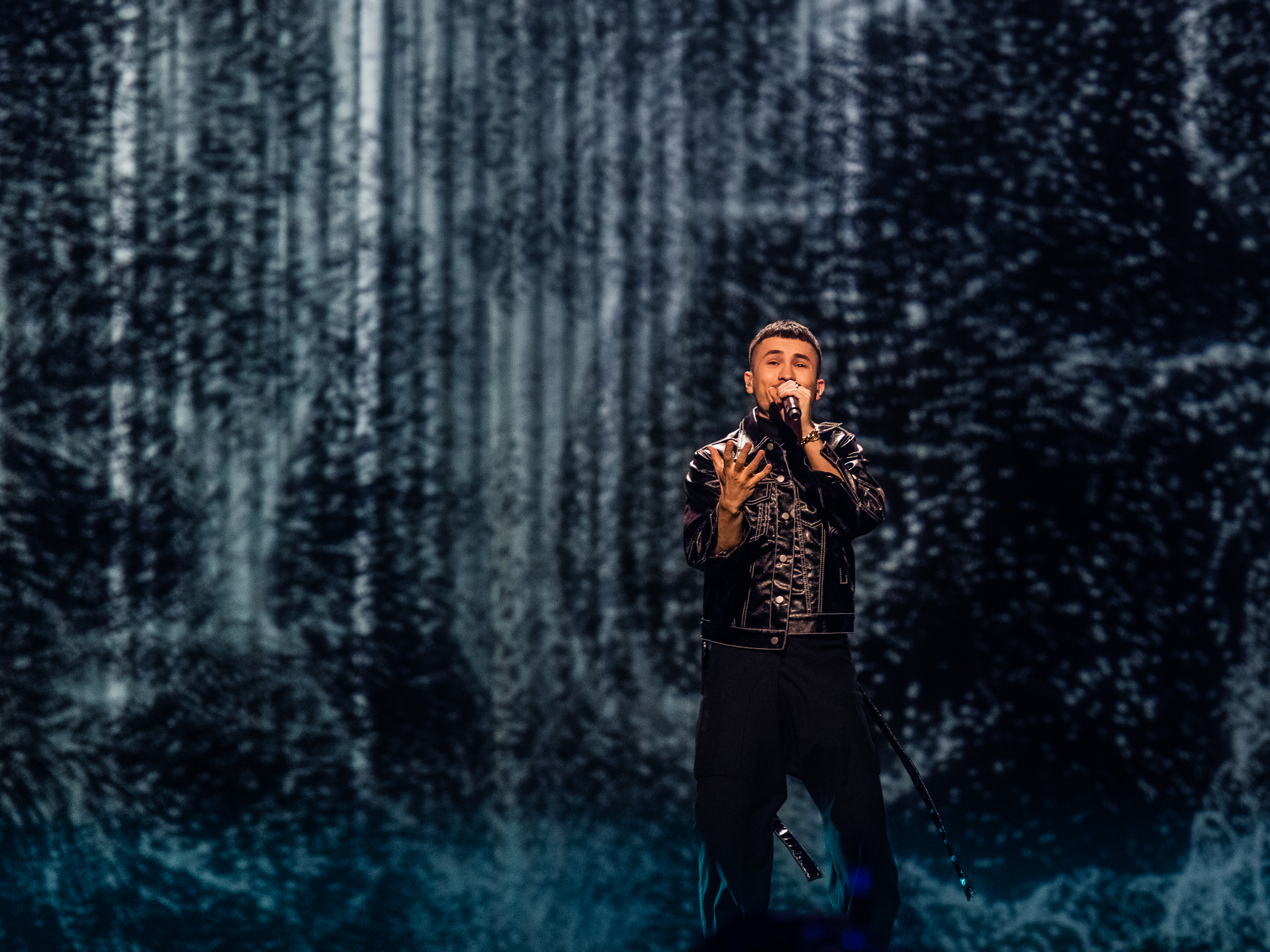 Paul Rey sjunger sitt bidrag "Talking in my sleep" på scenen i finalen i Melodifestivalen 2020 på Friends Arena